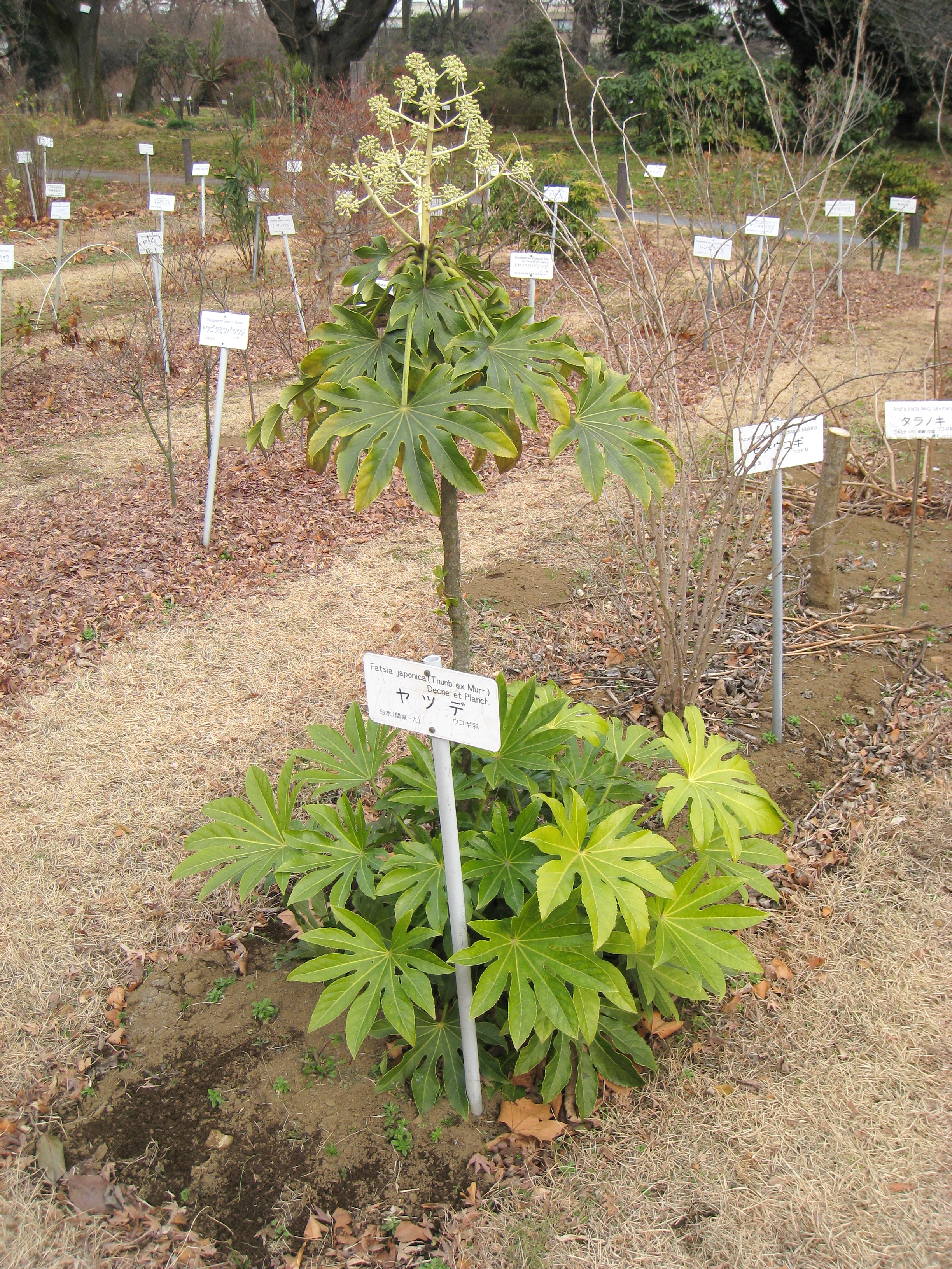 Fatsia japonica in Koishikawa Botanical Gardens, Tokyo, Japan.